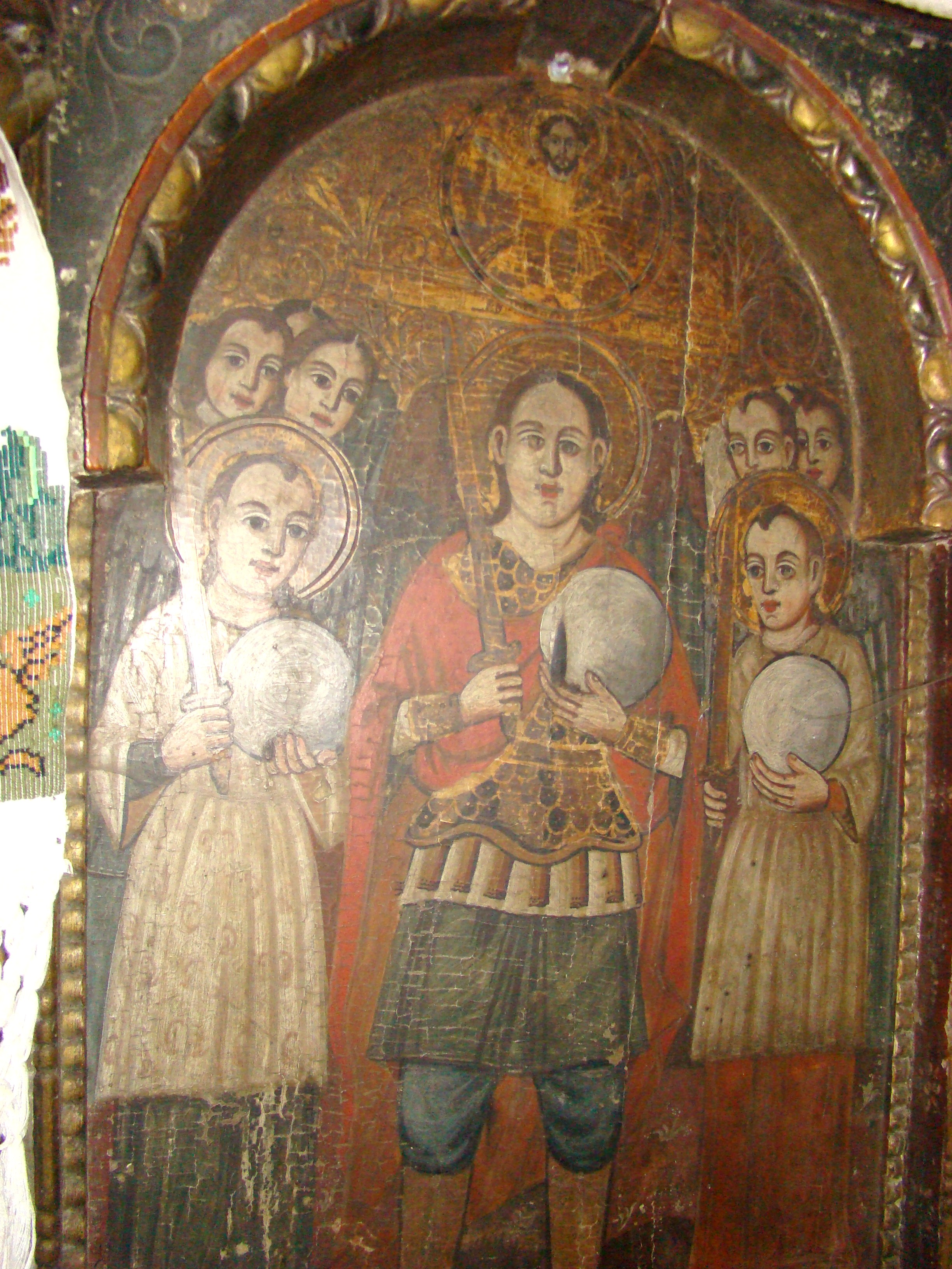 Biserica greco-catolică de lemn din Strâmtura, județul Maramureș